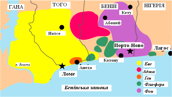 Мапа мов ґбе